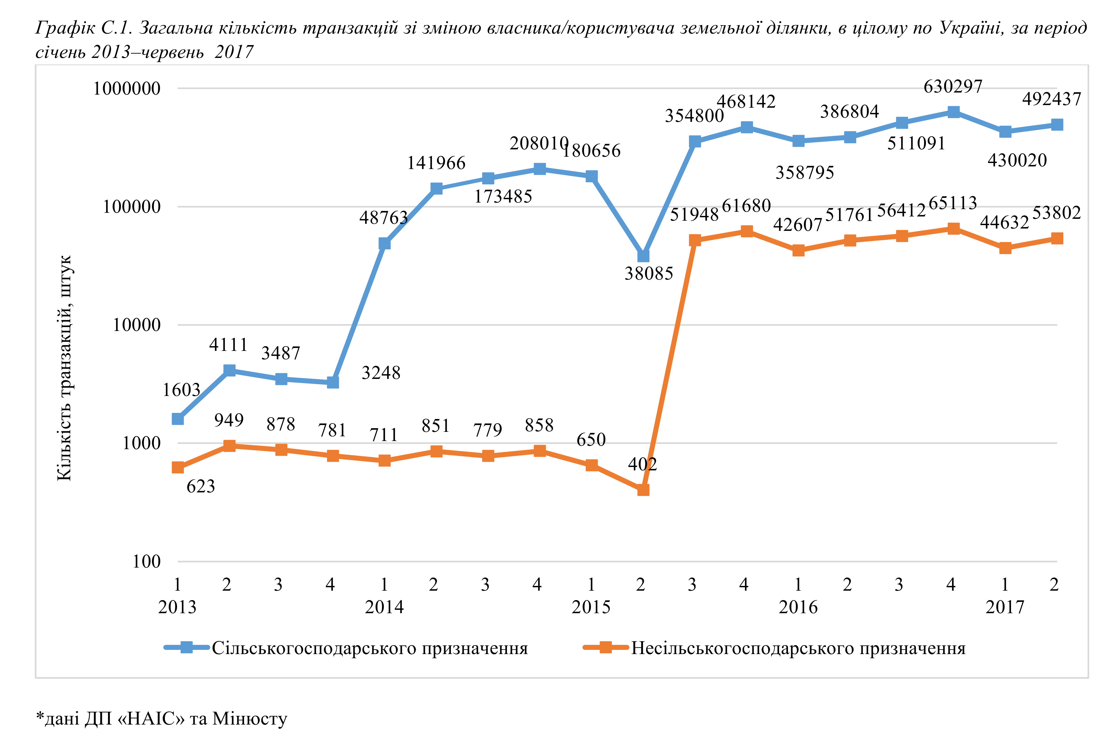 Загальна кількість транзакцій зі зміною власника/користувача земельної ділянки, в цілому по Україні, за період січень 2013–червень 2017 дані ДП «НАІС» та Мінюсту